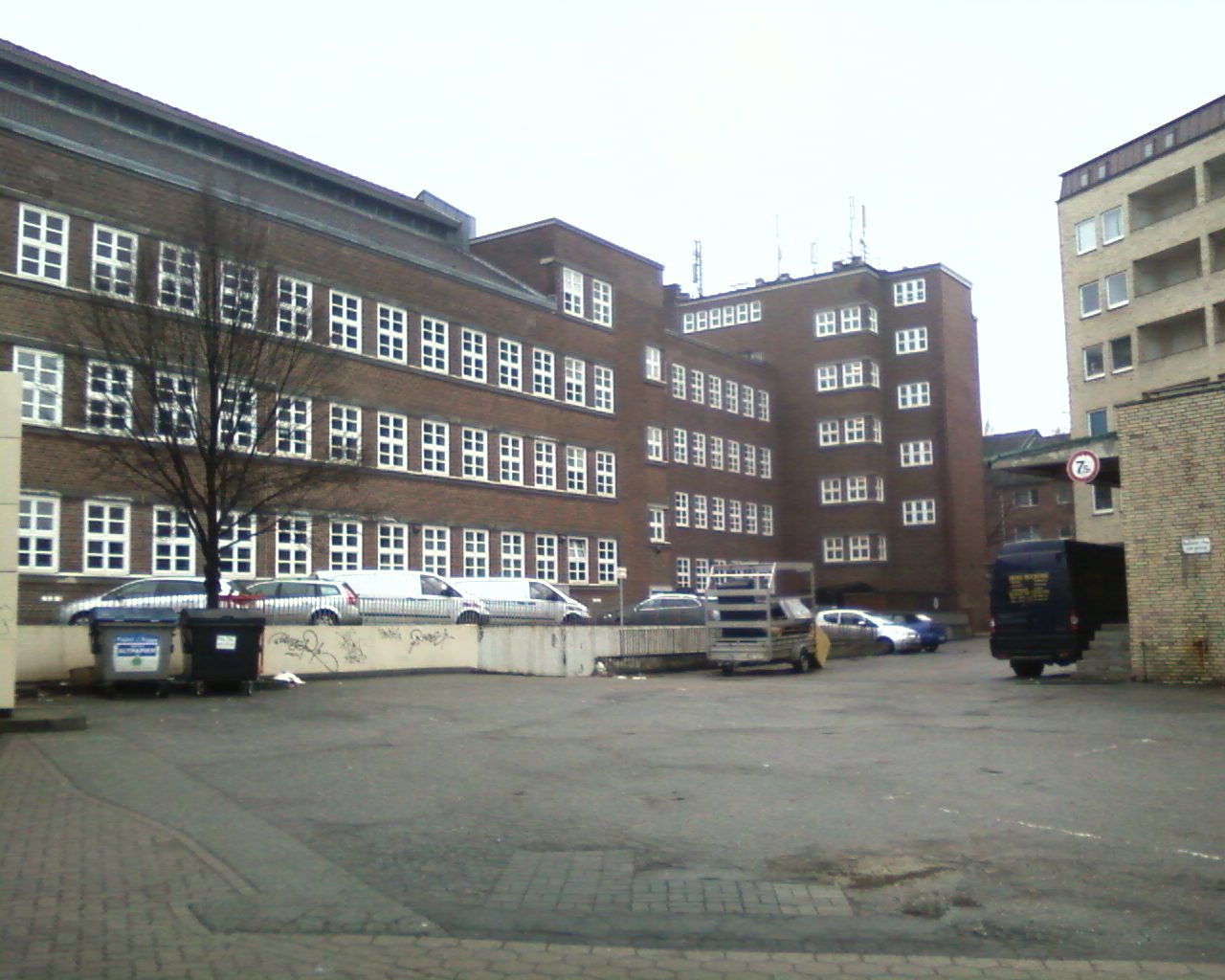 ehemaliges Fernmeldeamt in der Carl-Petersen-Str. 5 (Ansicht von der Sievekingsallee) This is a photograph of an architectural monument.